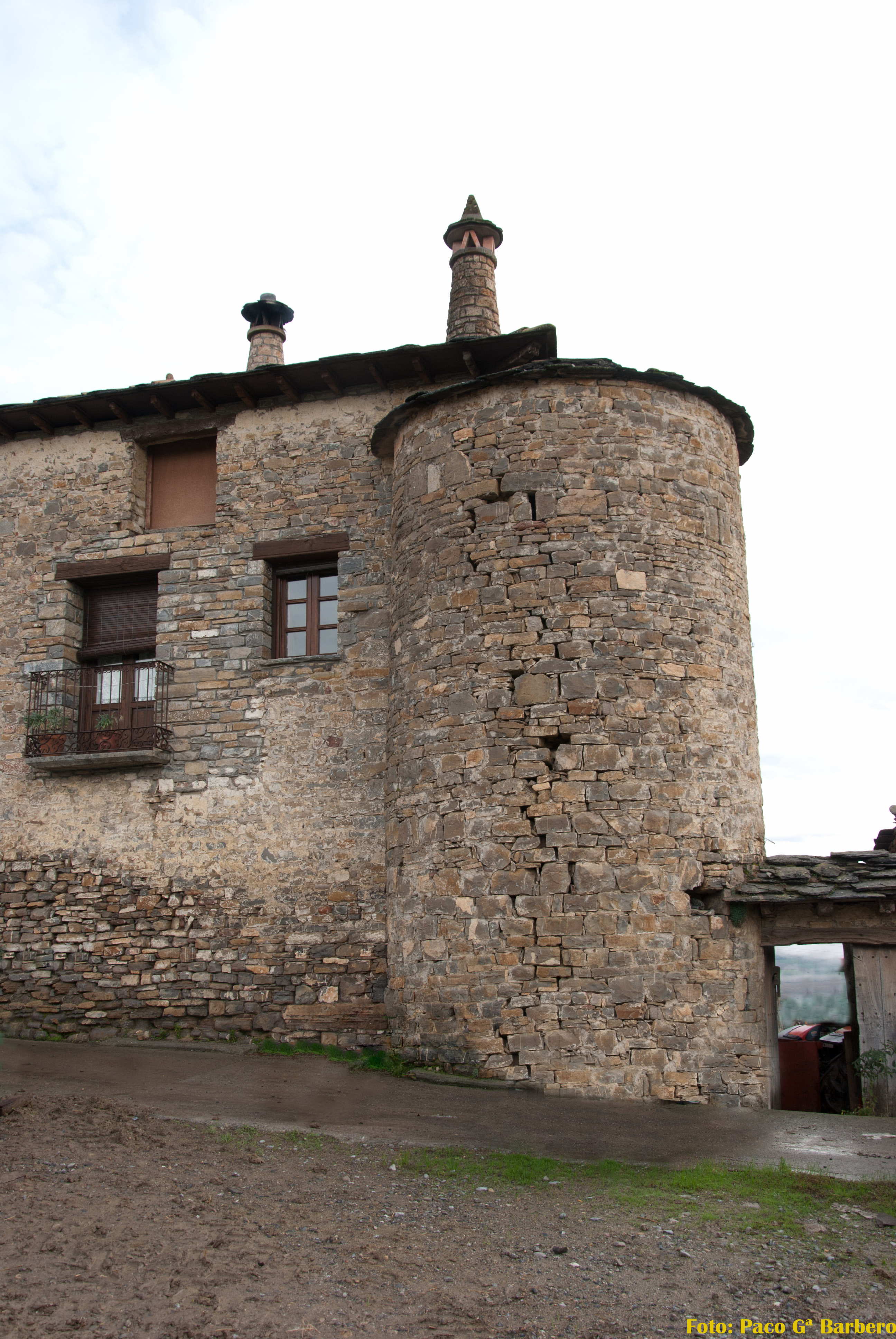 Torreón circular adosado a una esquina del conjunto defensivo en Casa Mur de Aluján.